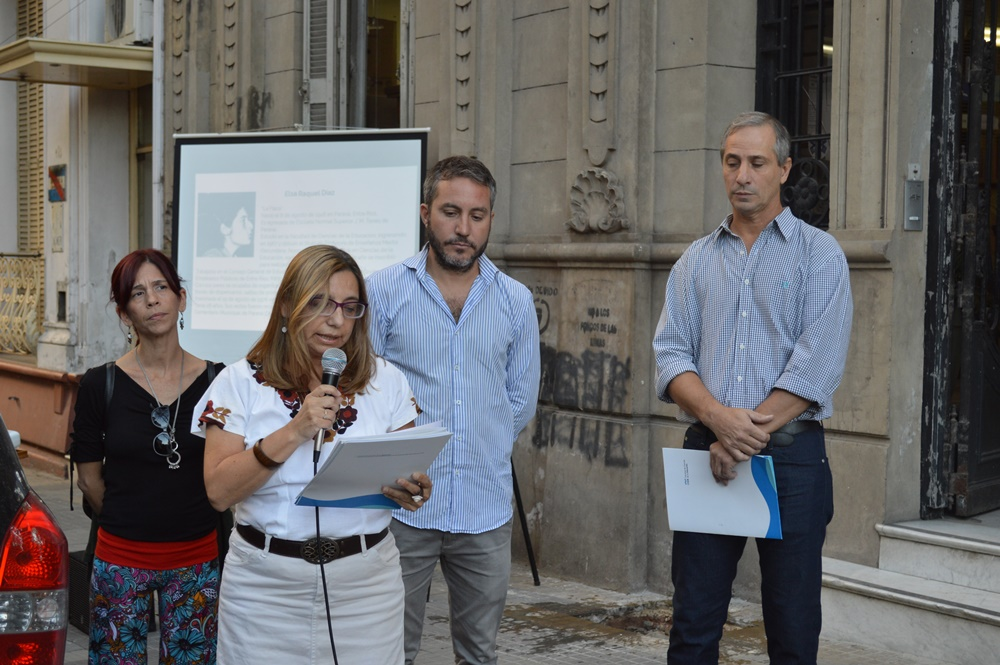 Baldosa por la Memoria en la Facultad de Ciencias de la Educación UNER